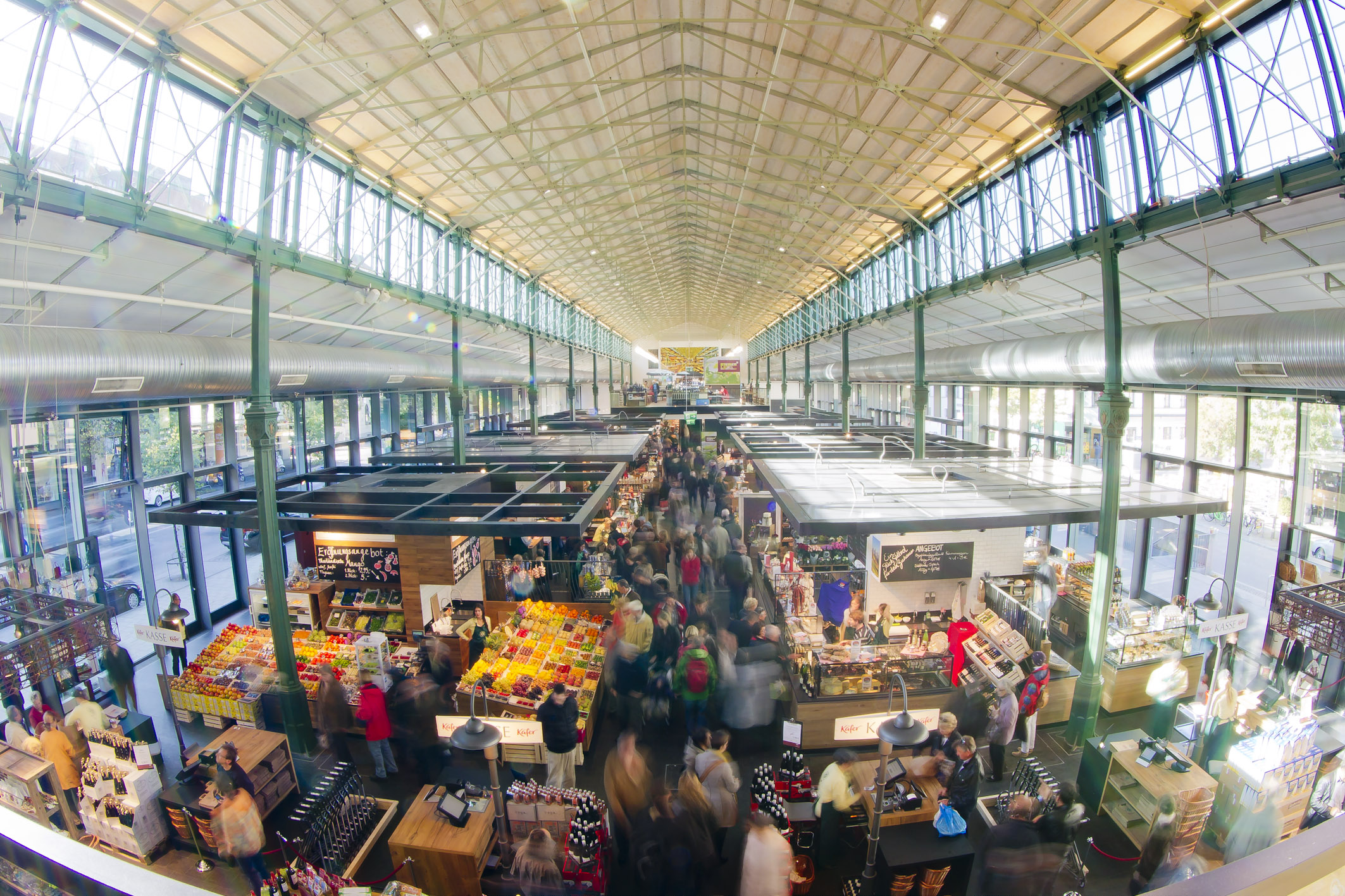 Neueröffnung der Schranne in München vom 13. Oktober 2011